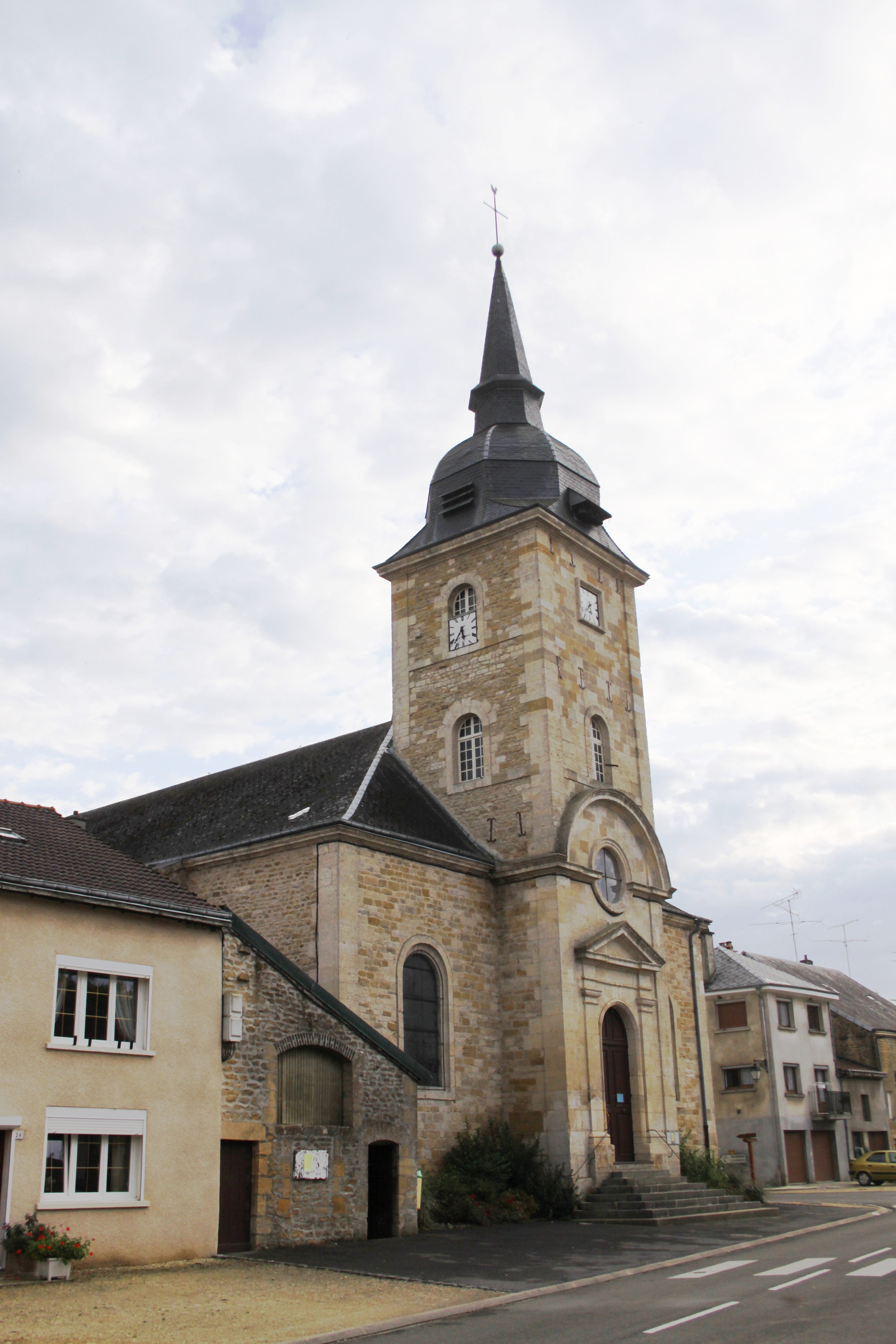 Village Ardennais